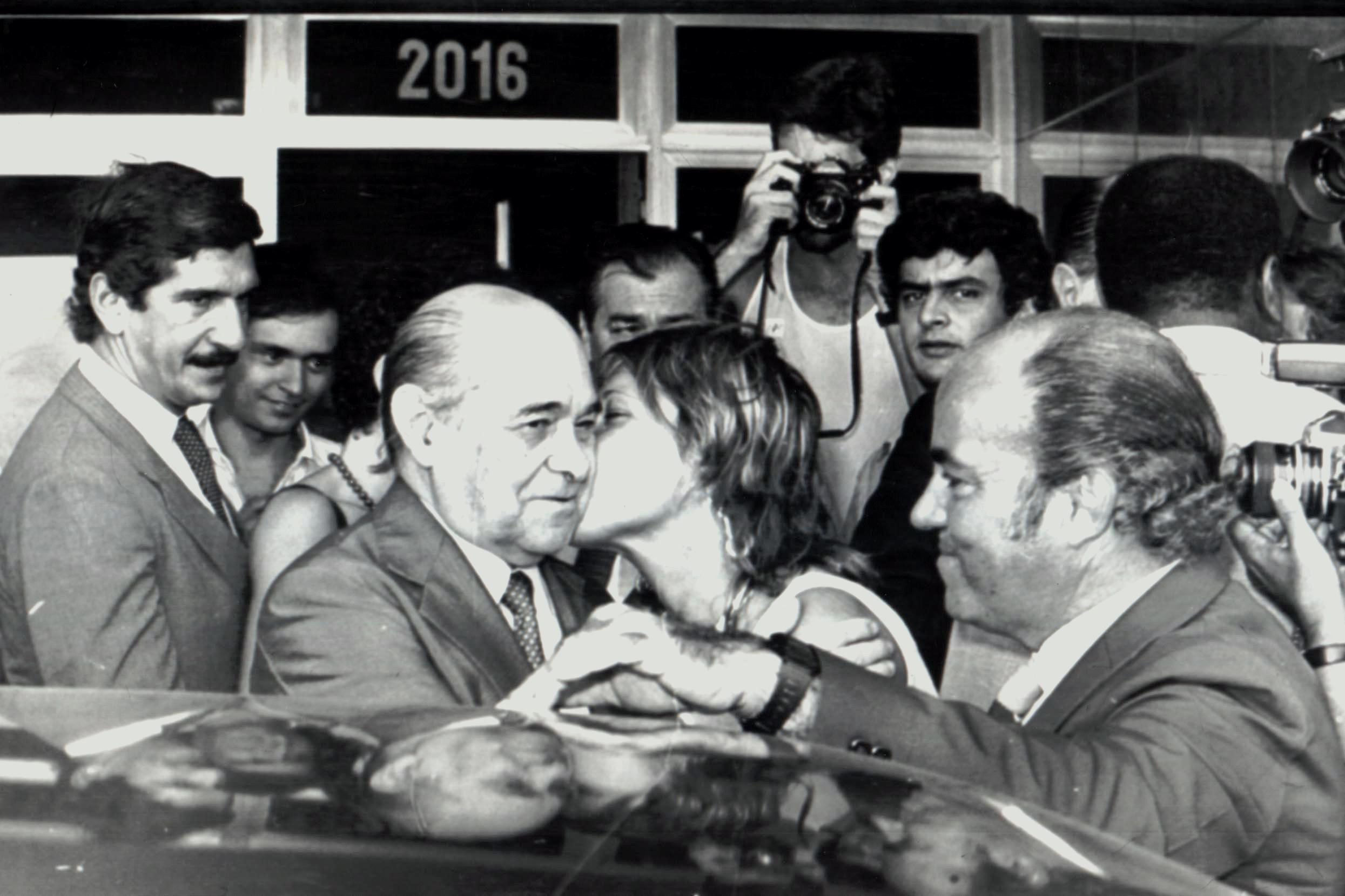 O político brasileiro Tancredo Neves em Brasília. Mais ao fundo seu neto, Aécio Neves (olhando em direção ao fotógrafo).